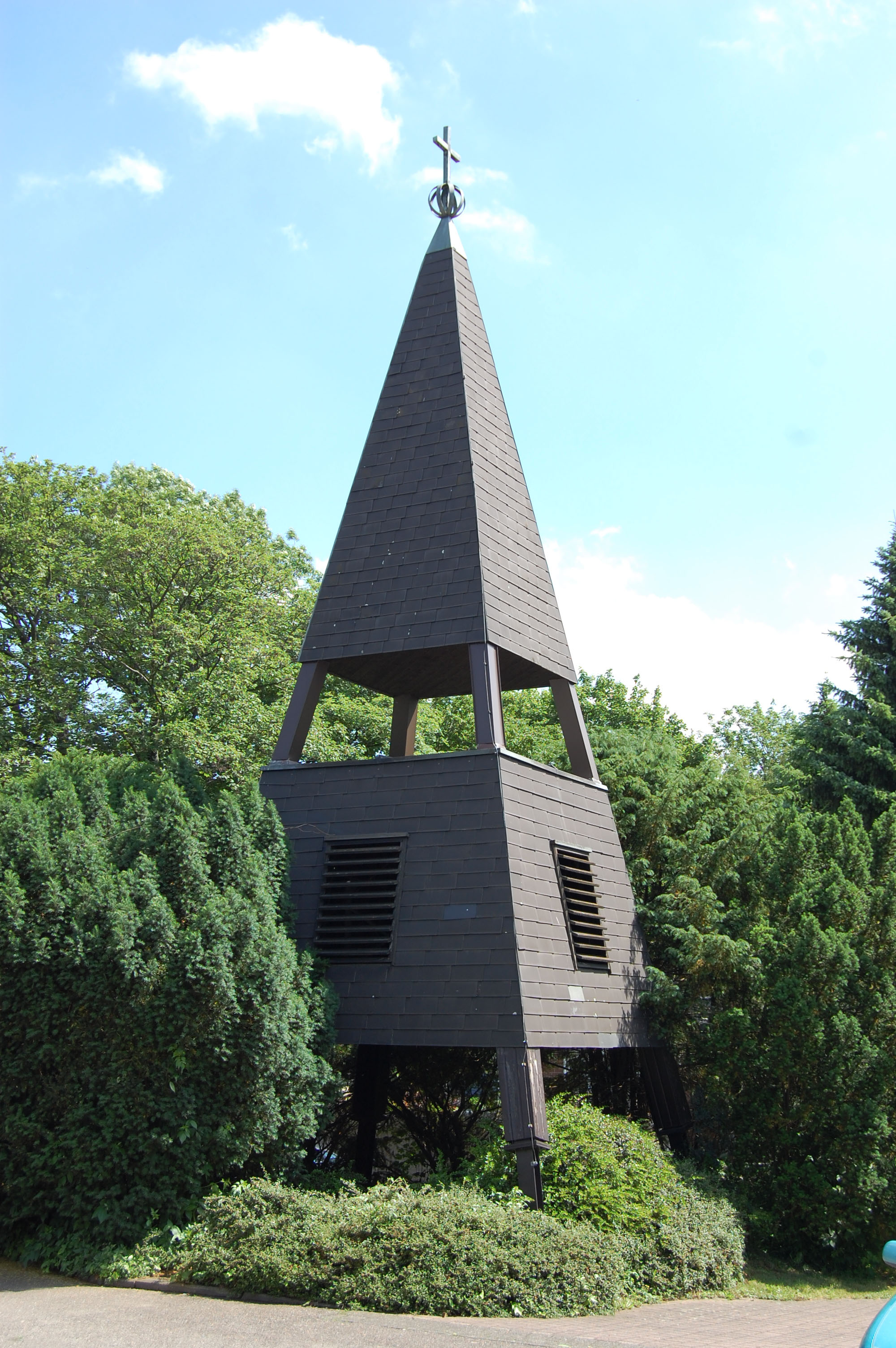 Nathan-Söderblom-Kirche, Hürth-Kendenich